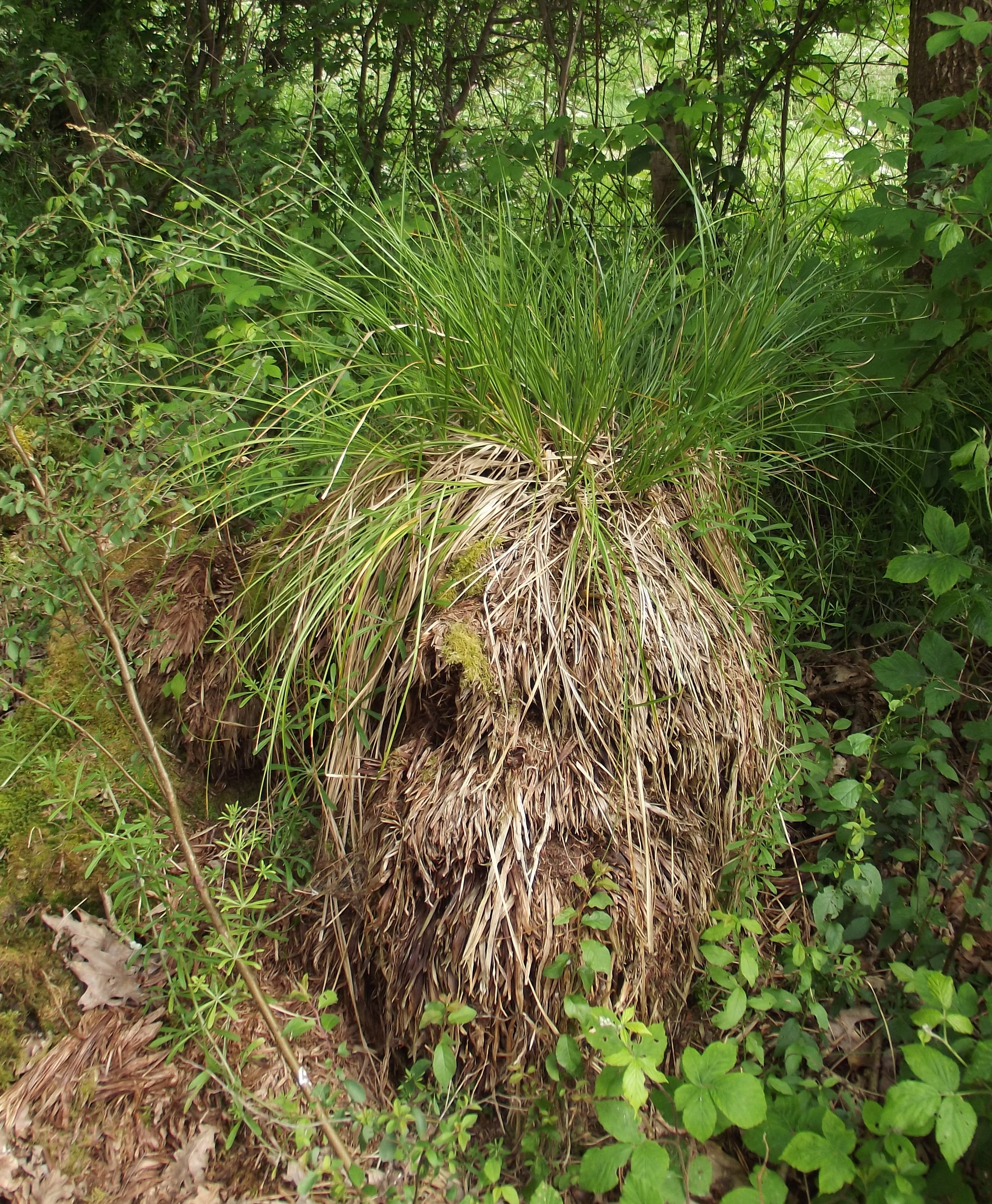 Carex paniculata